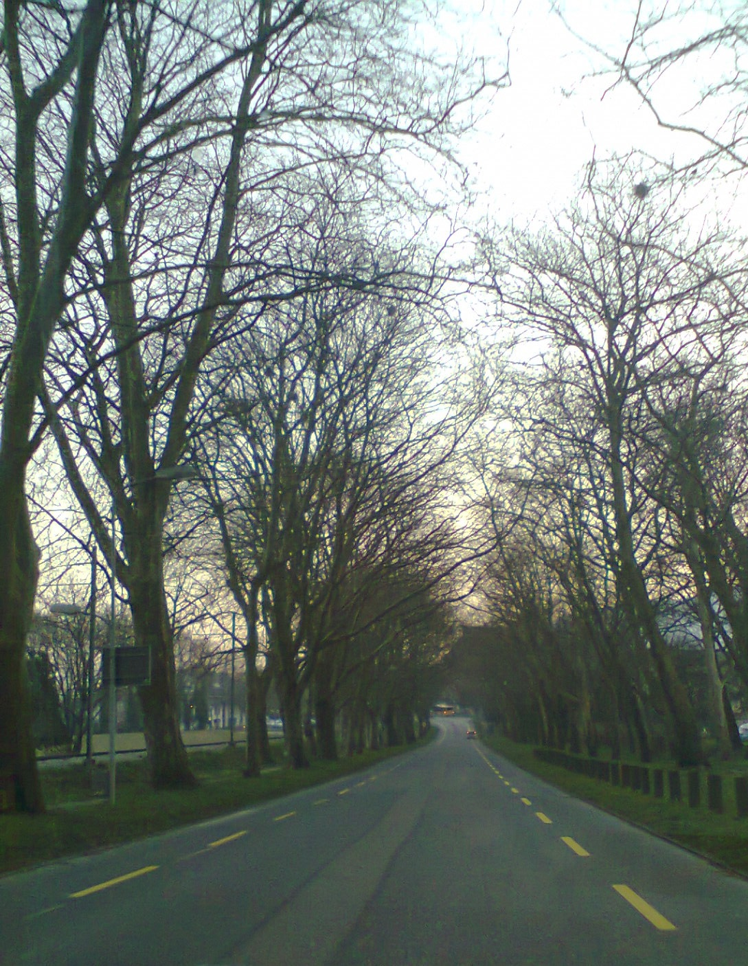 Colombier Les allées Canton de Neuchâtel